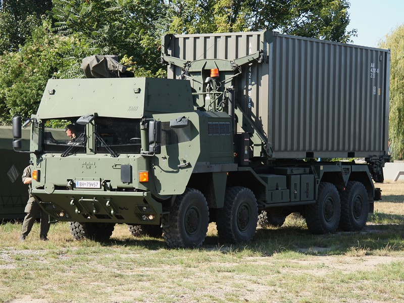 (c) - MAN 38.440 8x8 ÖBH gepanzert mit Hakenladesystem. Weitere Infos